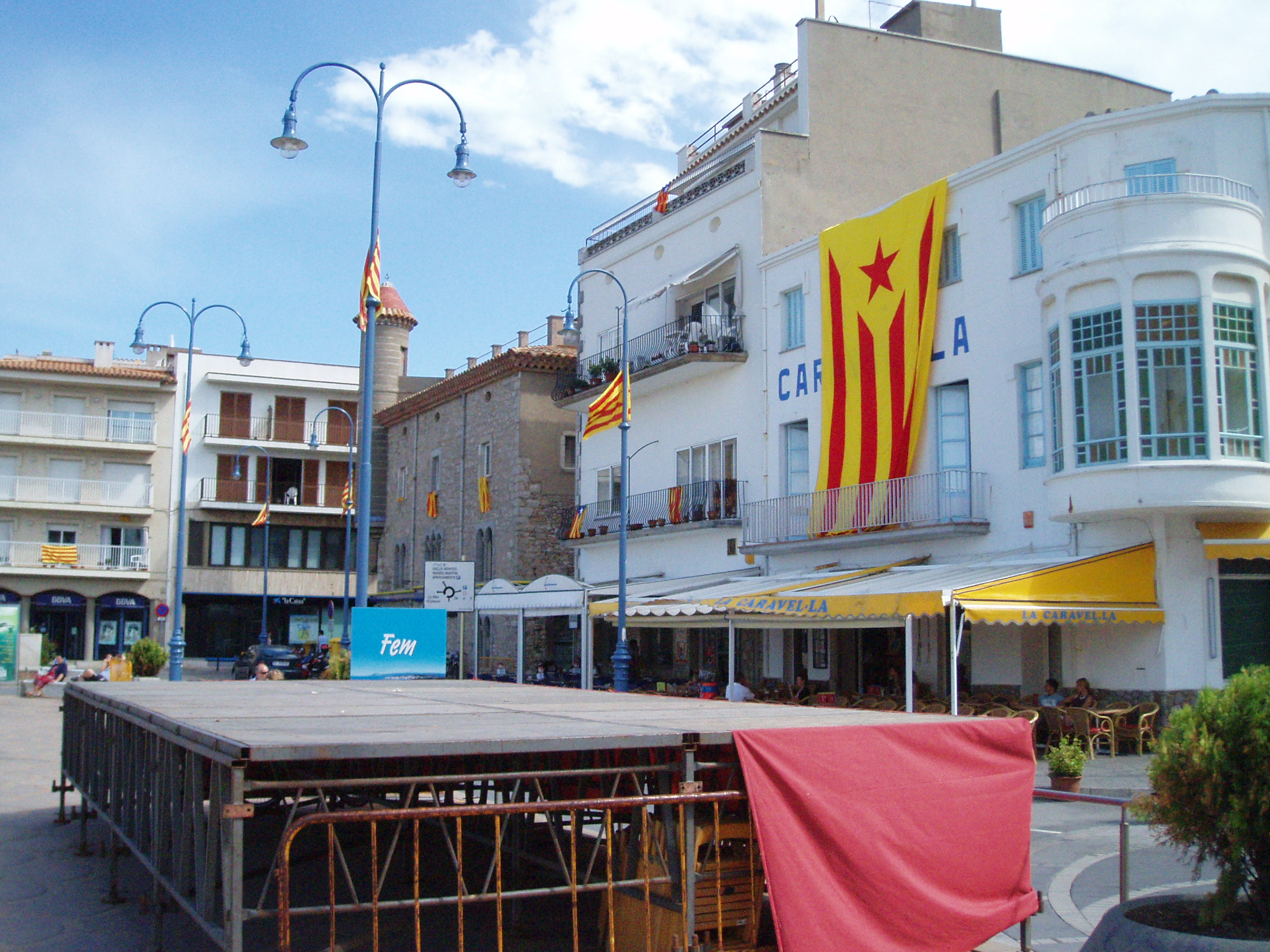 L'Escala (Catalonia)